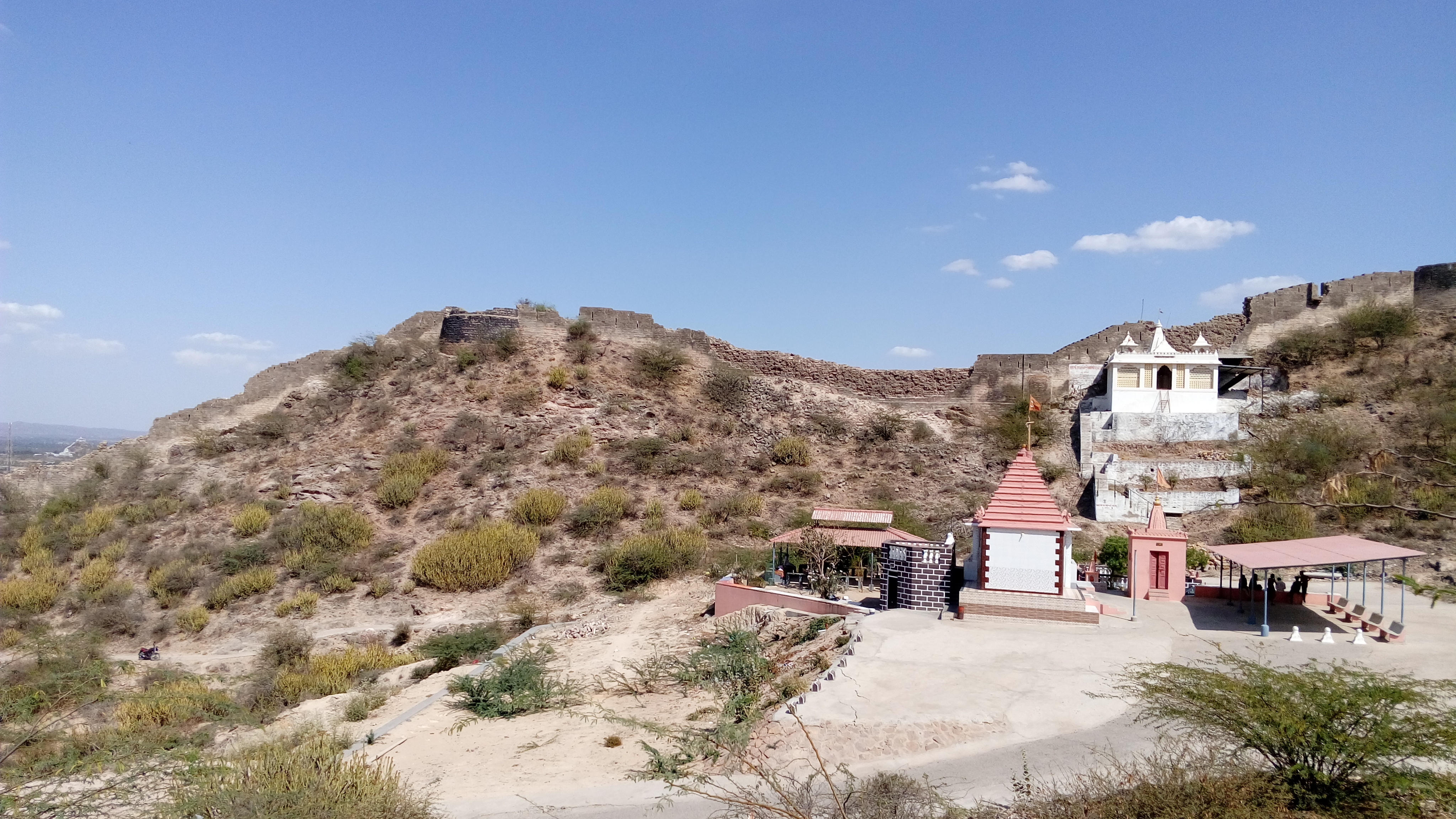 Bhujang Naga Temple